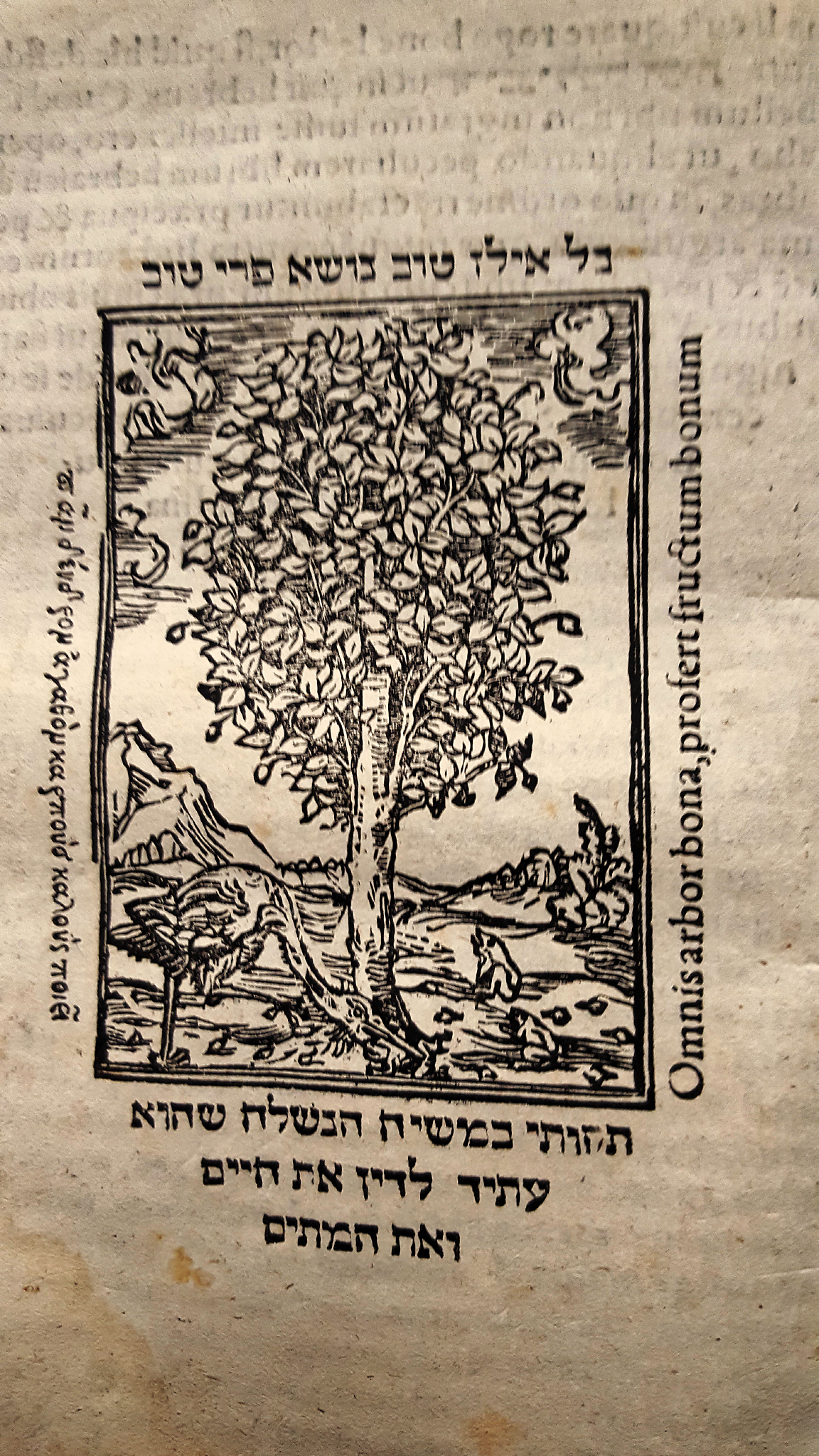 Buch aus der mittelalterlichen Predigerbücherei